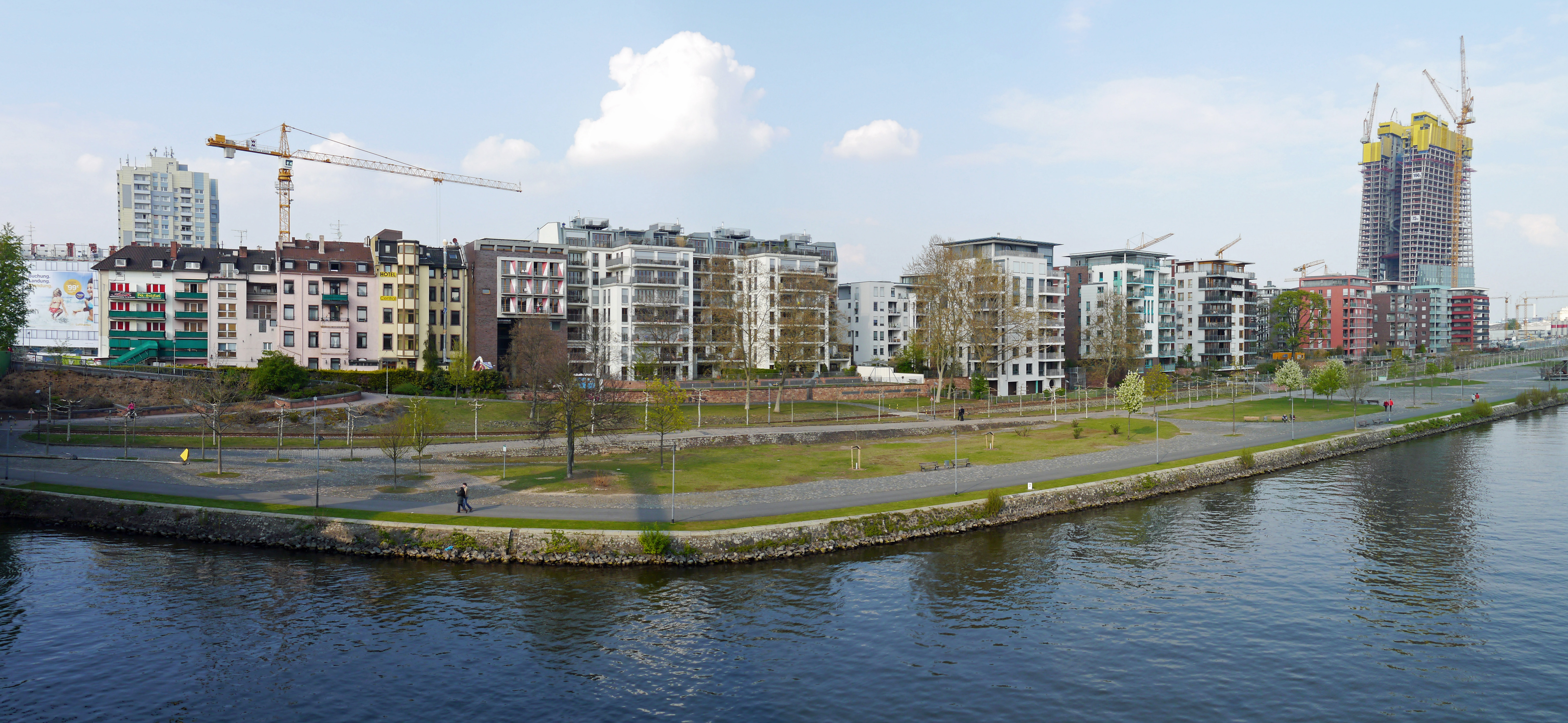 Wohngebaeude auf dem Mainufer des Ostendes in Ffm. 2012 zwischen Floesserbruecke und EZB-Baustelle.